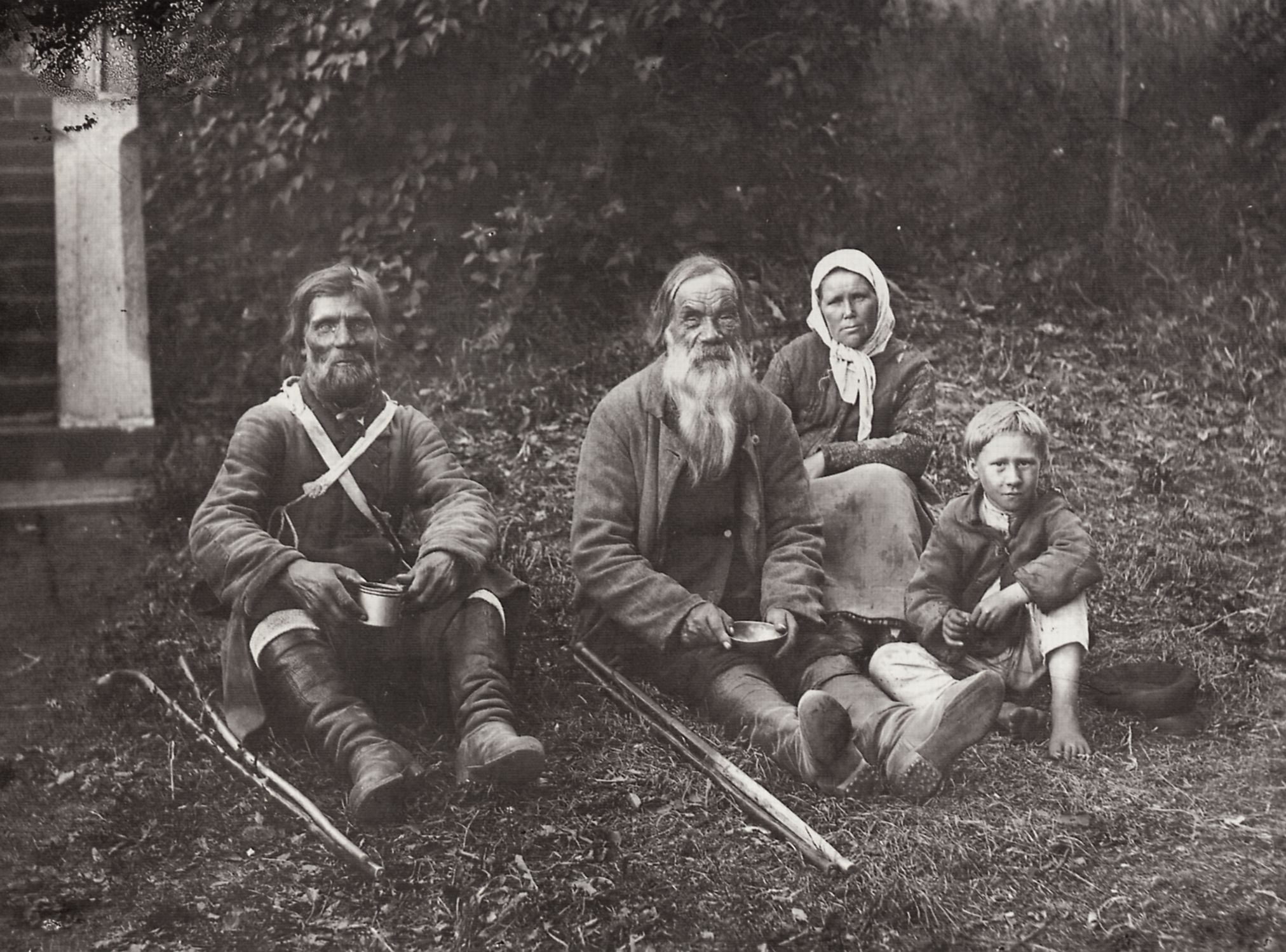 Russischer Photograph um 1900: Wandernde Tagelöhner bei einer Rast. St. Petersburg